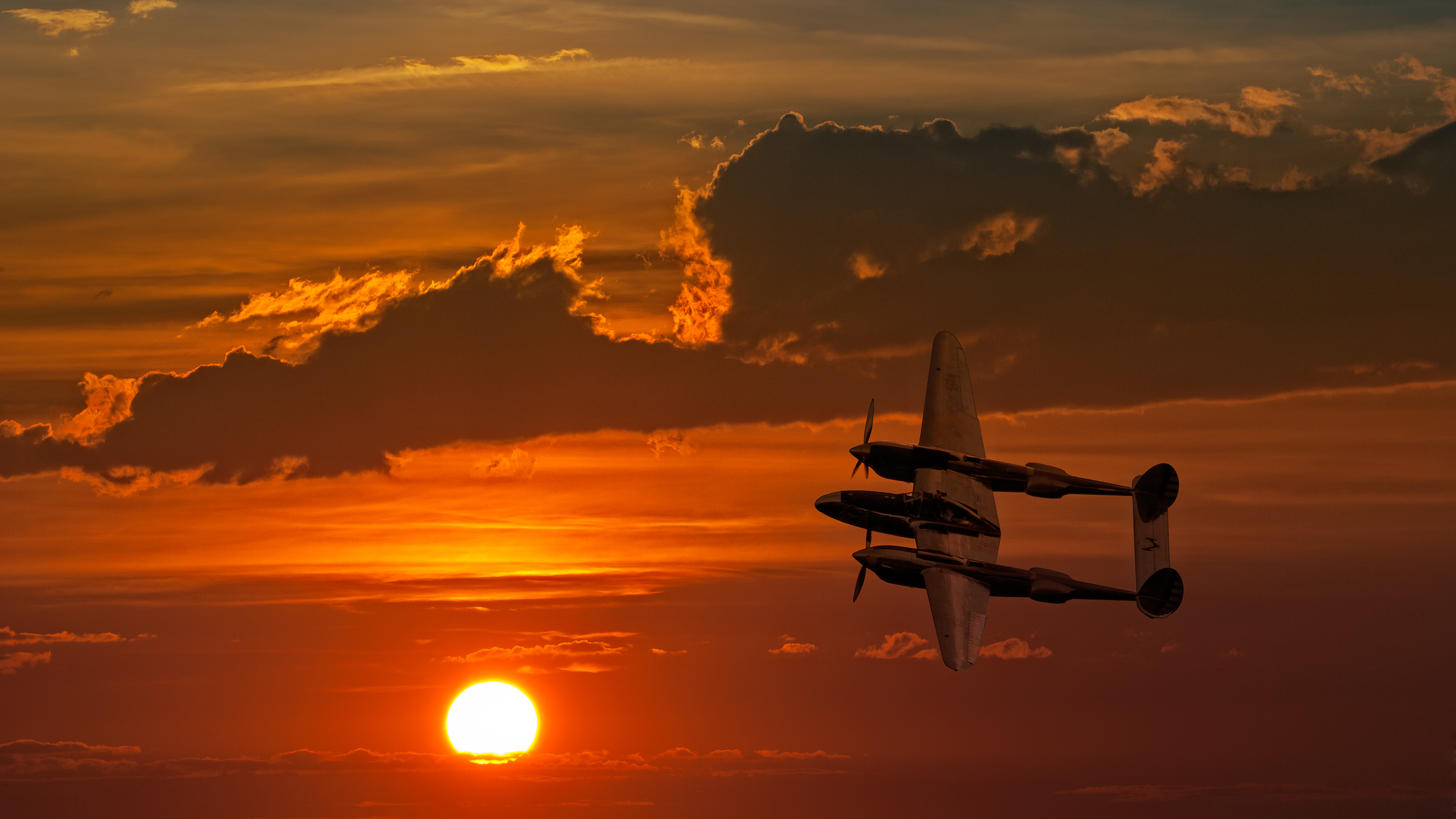 Lockheed P-38 Lightning, Flug während des Sonnenuntergangs beim Oldtimer Fliegertreffen Hahnweide.